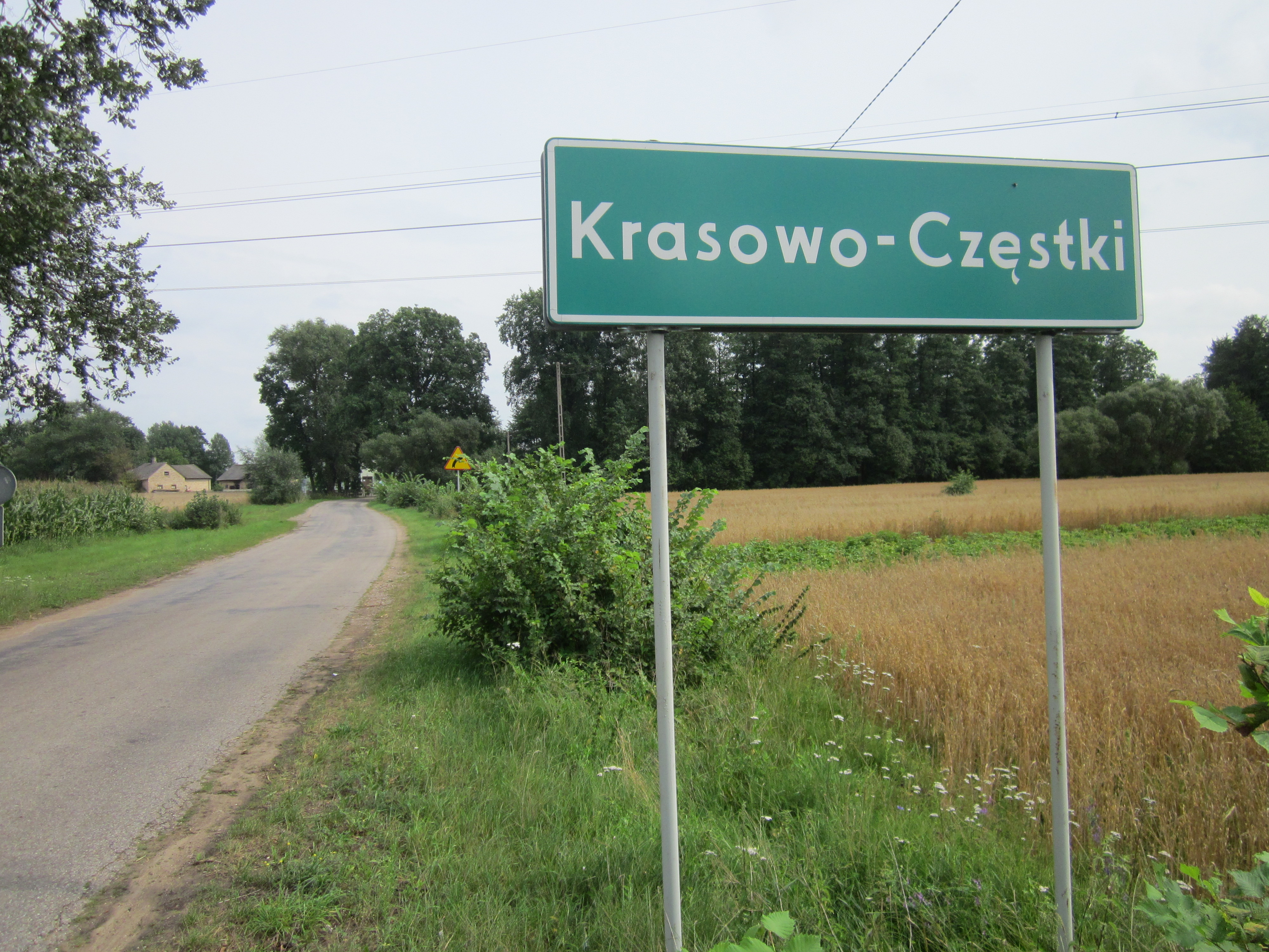 Widok od strony Krasowa Wólki